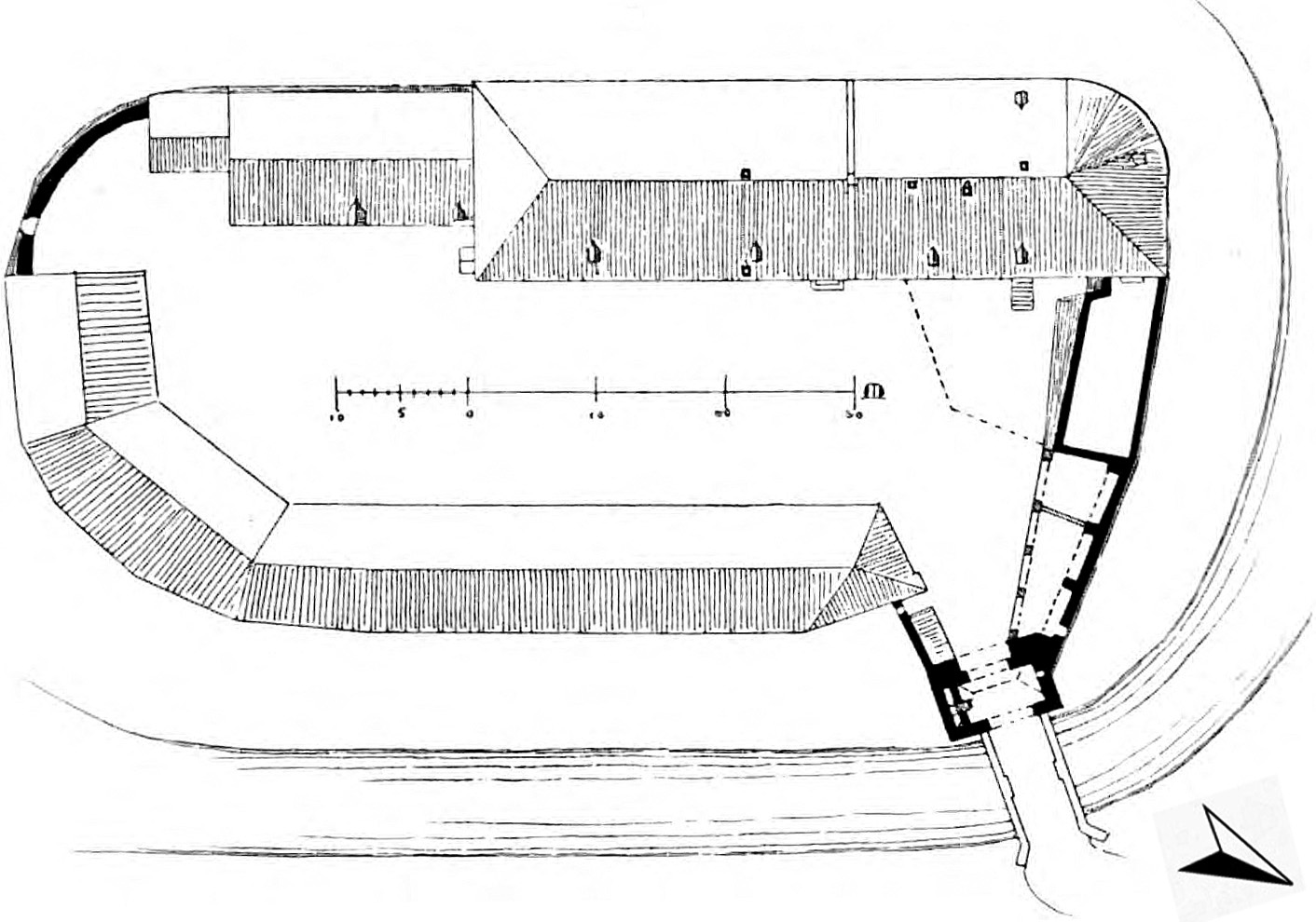 Grundriss der Burg Angermund in Düsseldorf